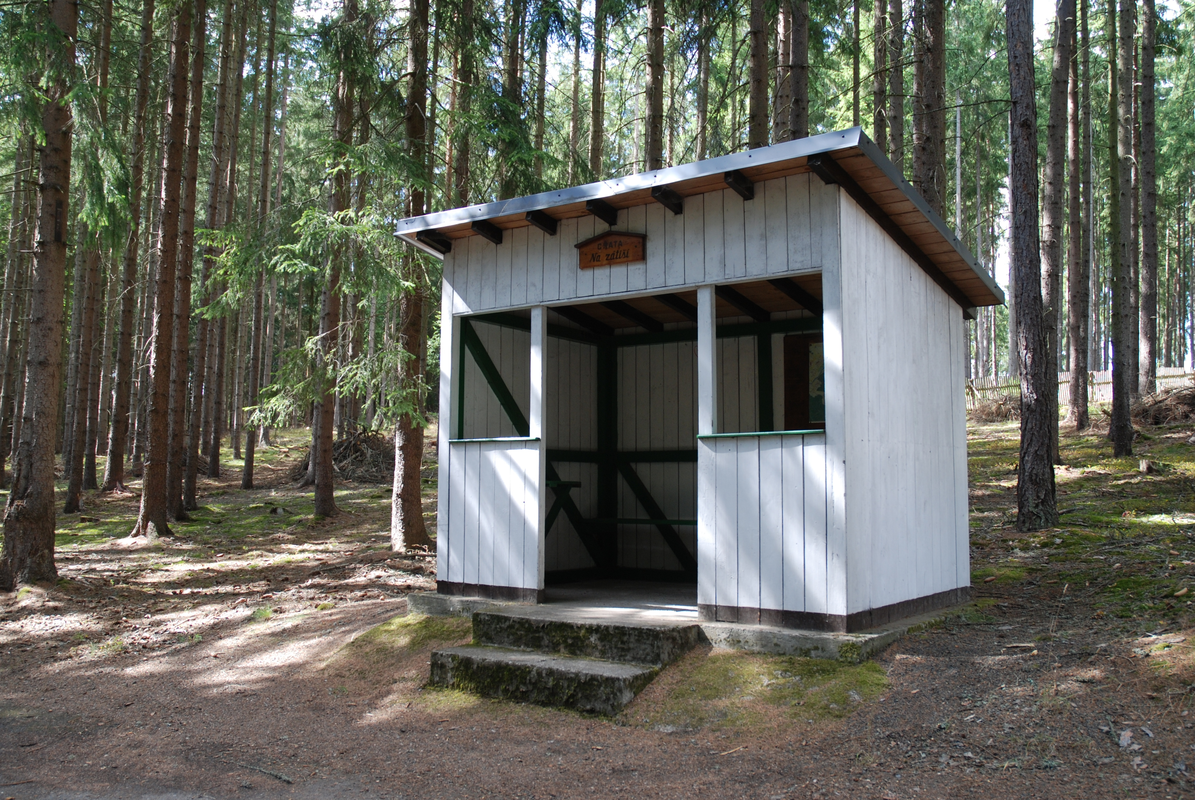 Chata Na Zátiší v karlovarských lázeňských lesích při Okružní cestě